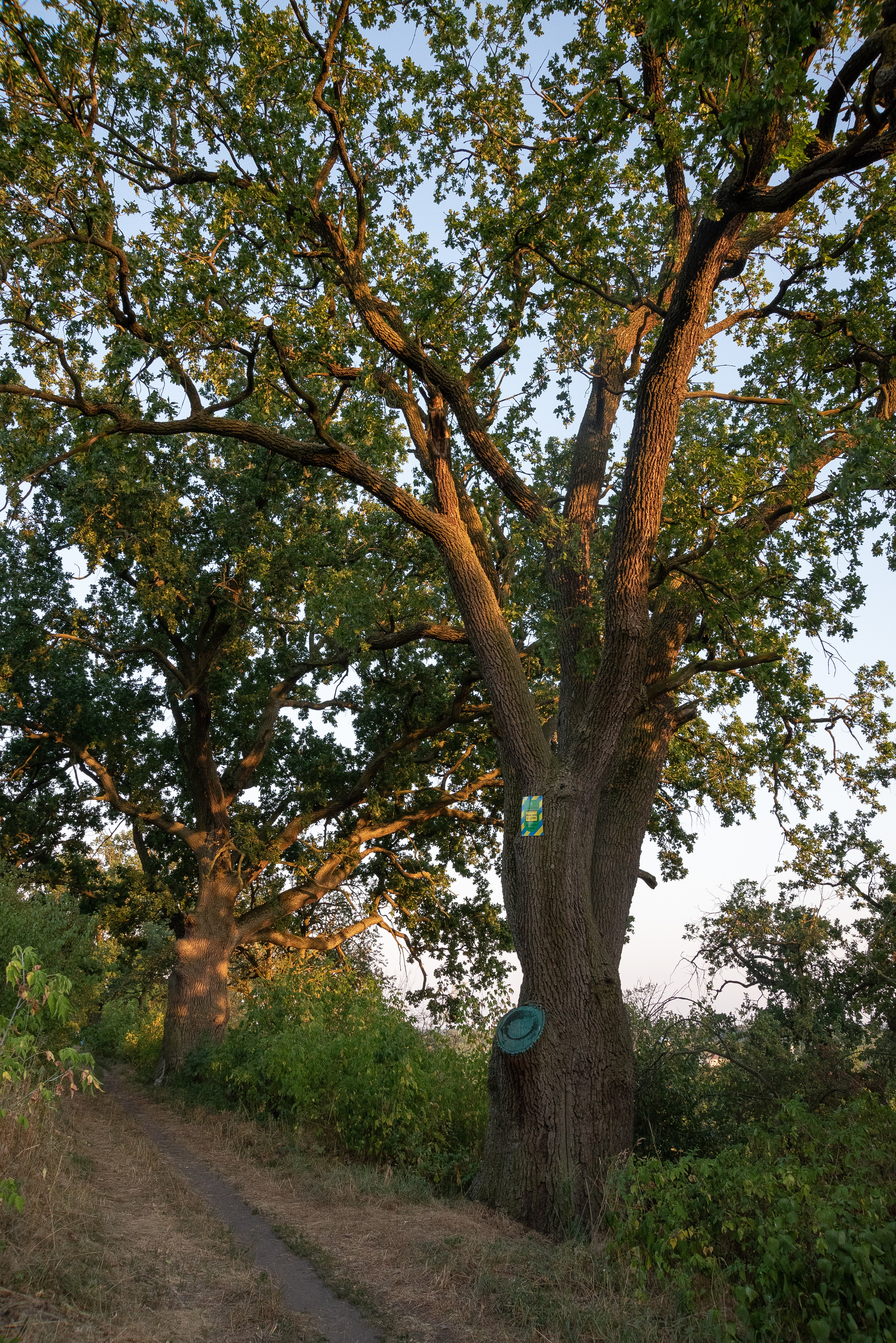 Три дуби, Старинська сільська рада Бориспільського району